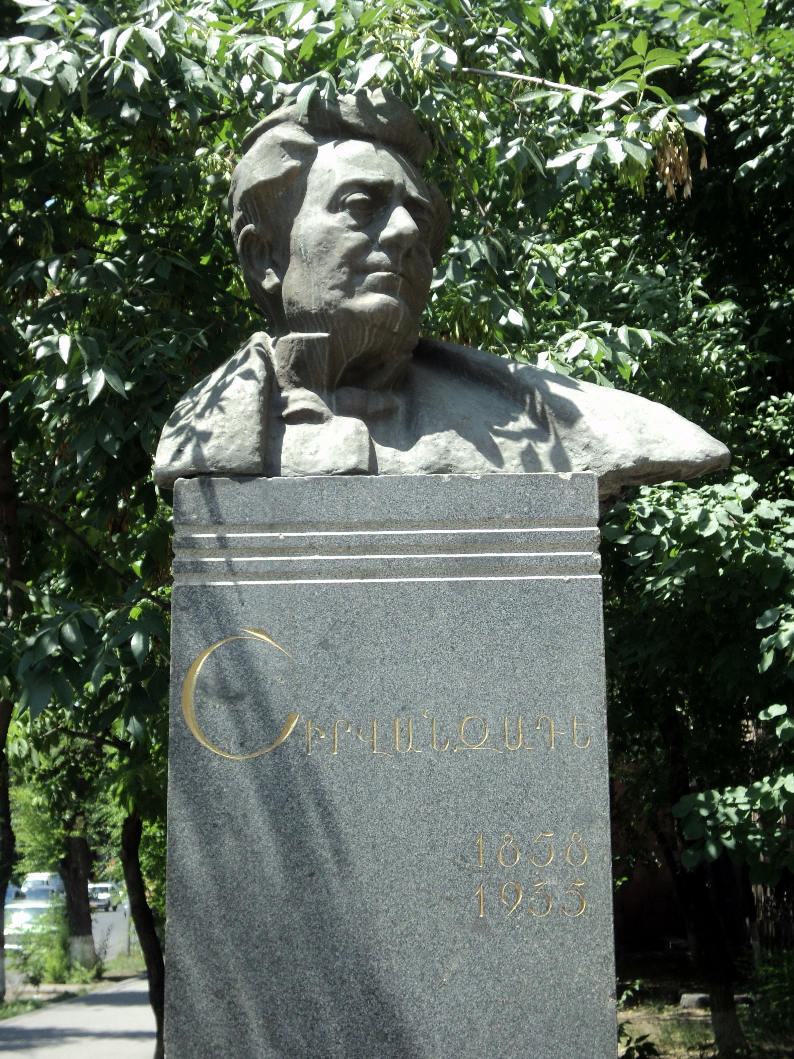 Շիրվանզադեի արձանը Փափազյան փողոցում` նրա անվան դպրոցի առջև: Քանդակագործ Արա Հարությունյան, 1957 3/12